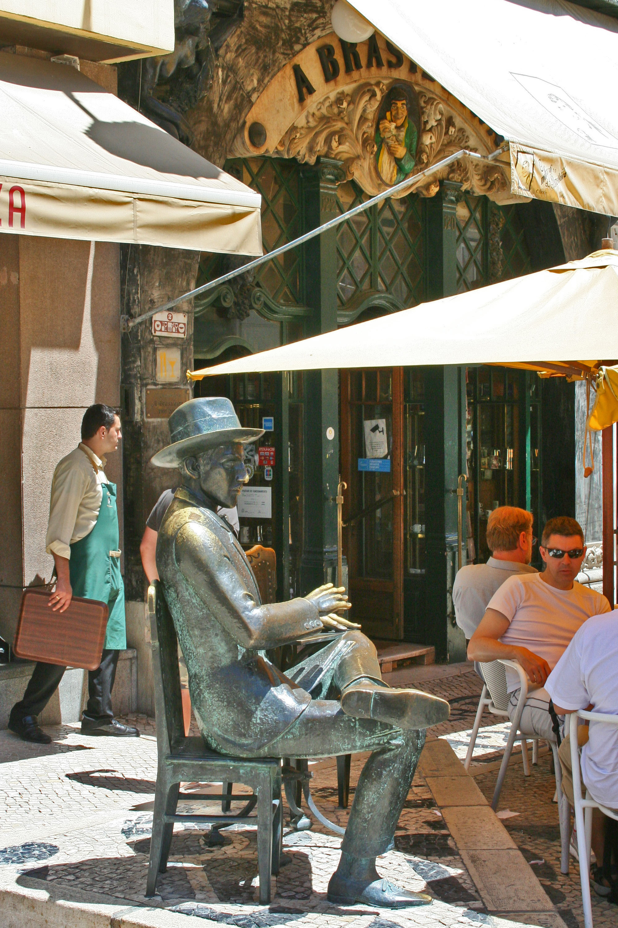 Café A Brasileira, Café A Brasileira do Chiado ou Brasileira do Chiado This file was uploaded for Wiki Loves Monuments in Portugal with the unique identifier 74475.